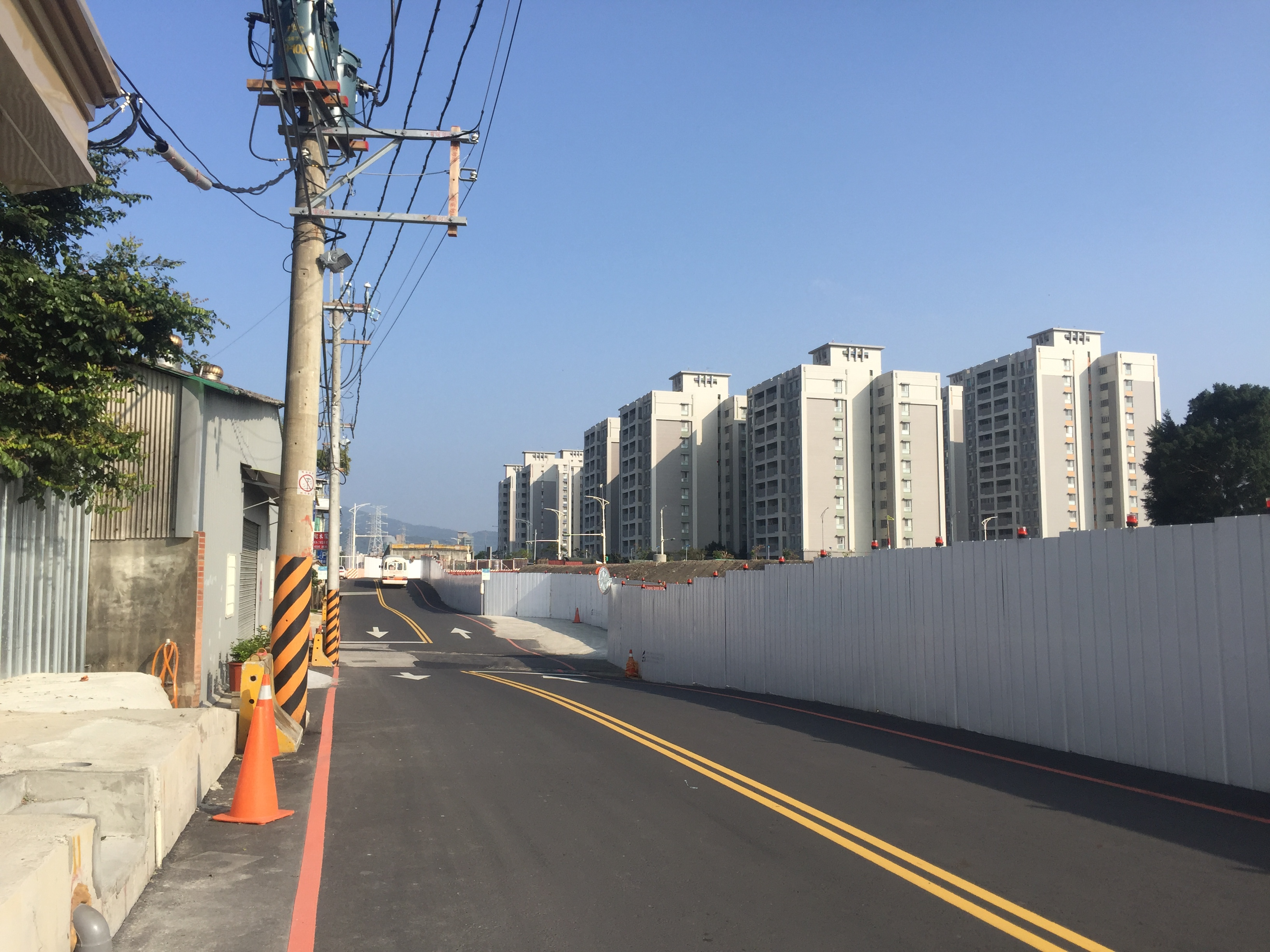 中文（台灣）: 台北市北投區 洲美街